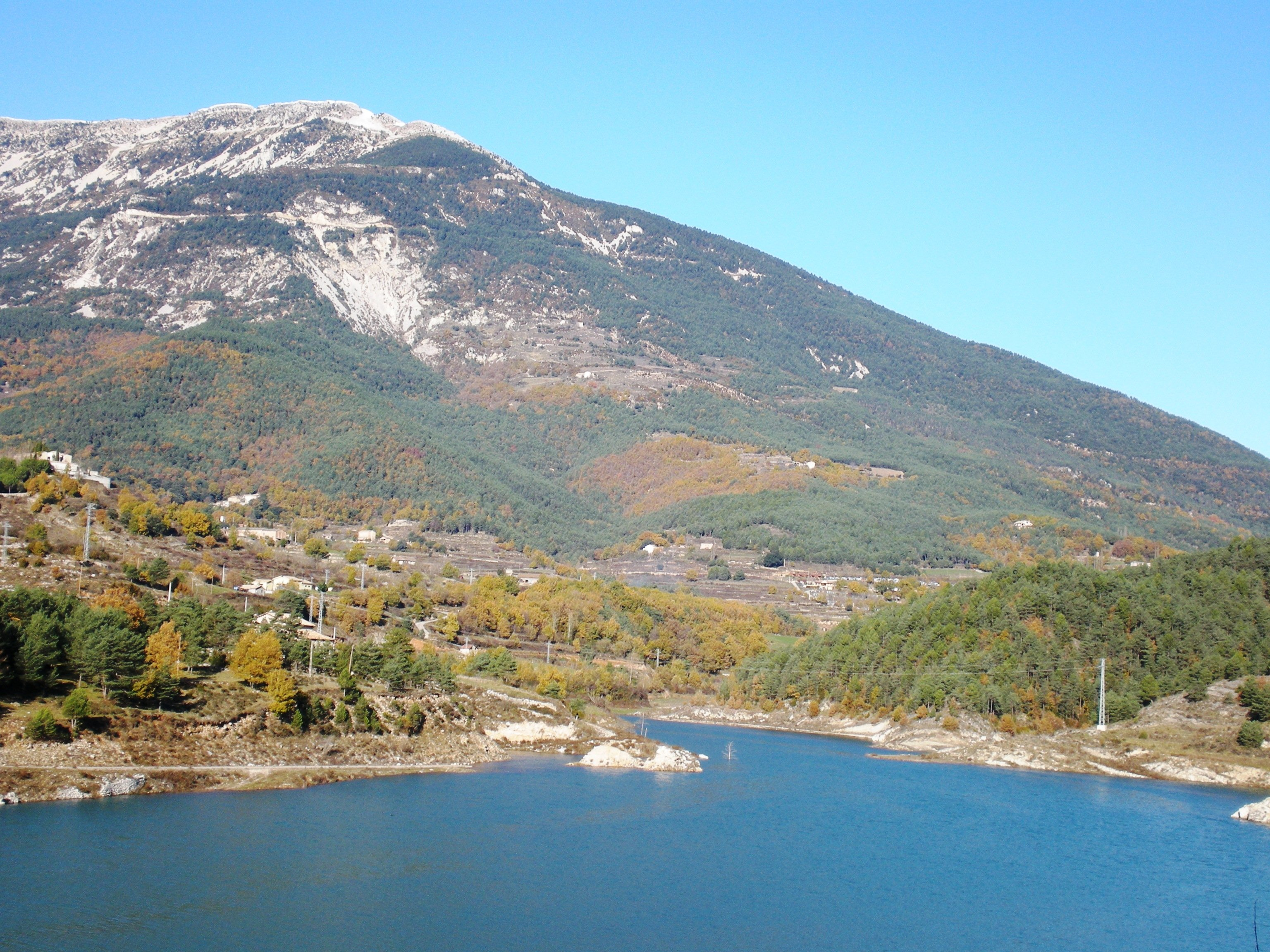 El torrent dels Plans (Vall de Lord)